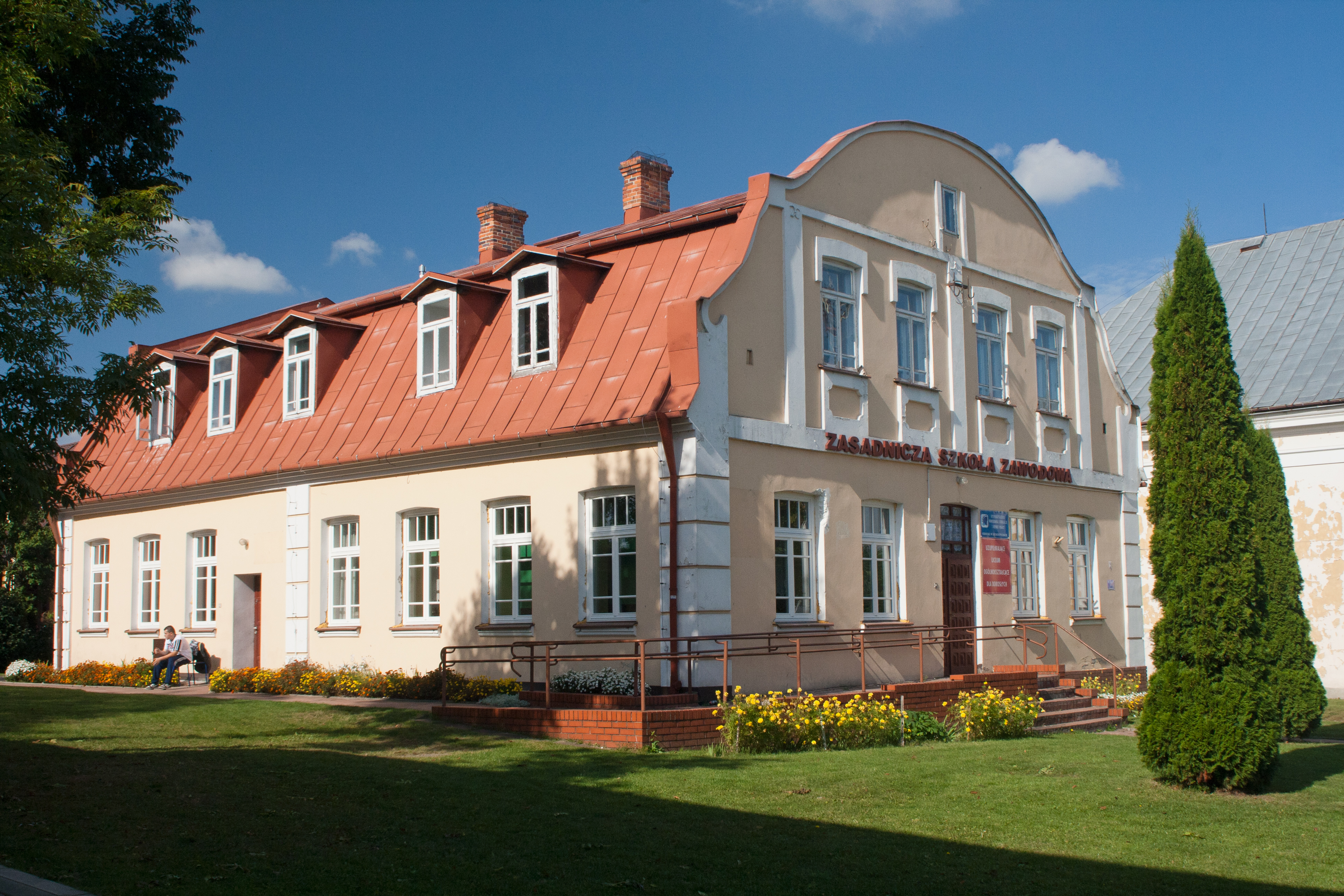 Siemiatycze, Dom talmudyczny, przy synagodze (obecnie szkoła), mur., 1893, ul. Pałacowa 10 10.1992.